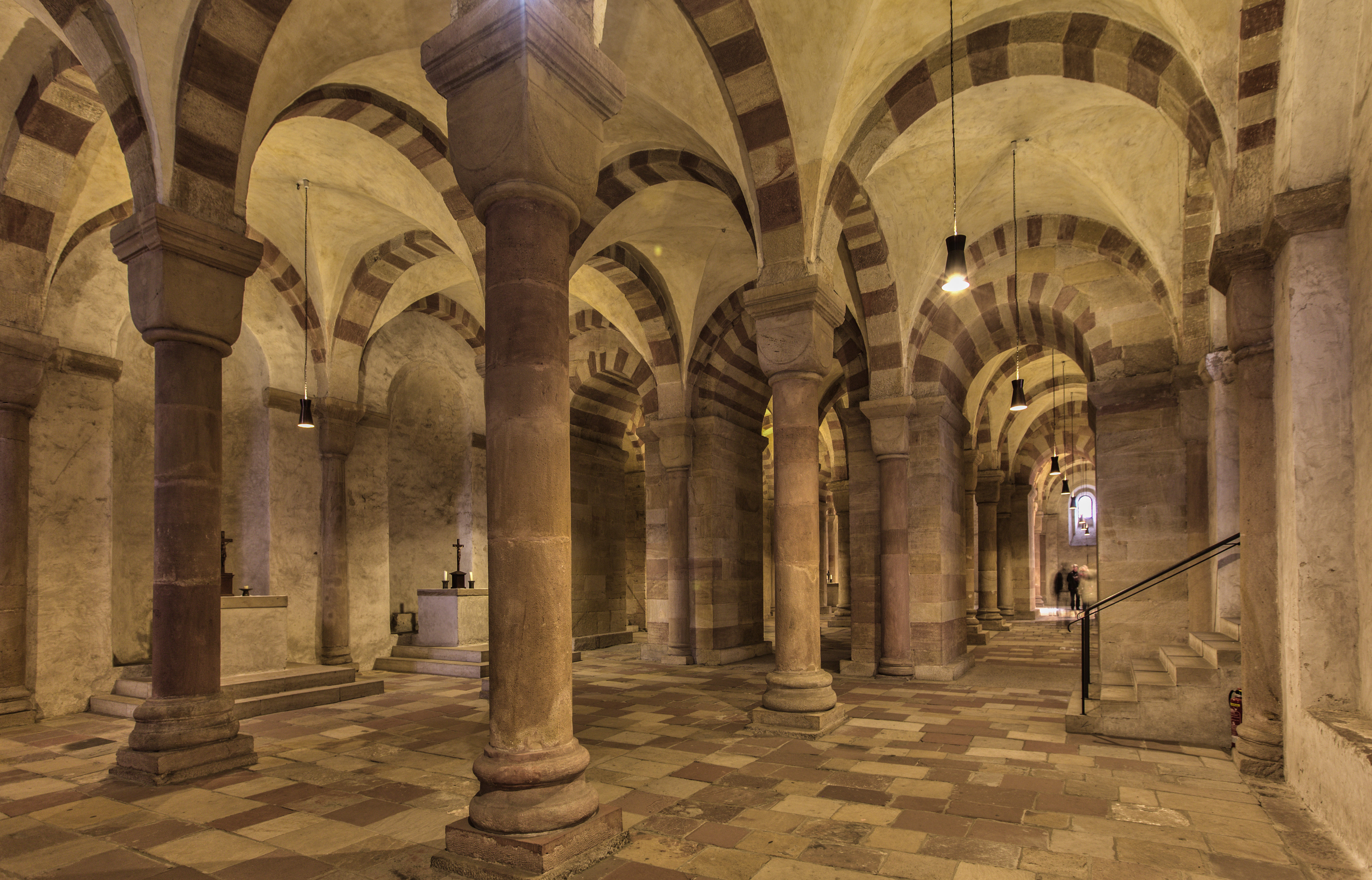 Krypta des Doms zu Speyer